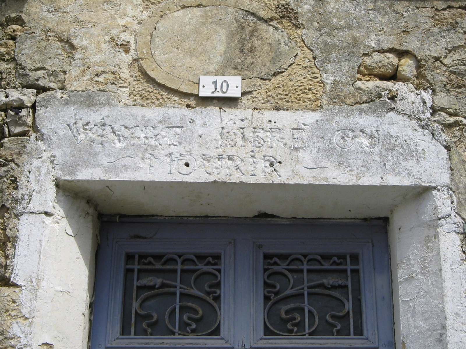 L'inscription "vivre libre ou mourir" à Exoudun en mai 2013